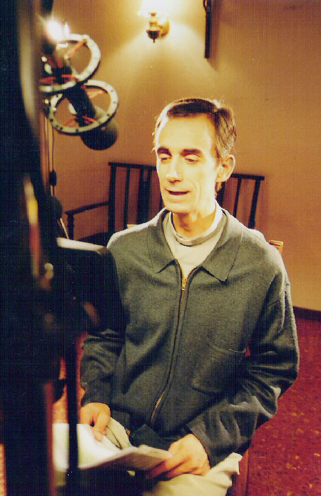 César Sarachu en la grabación de Güebones